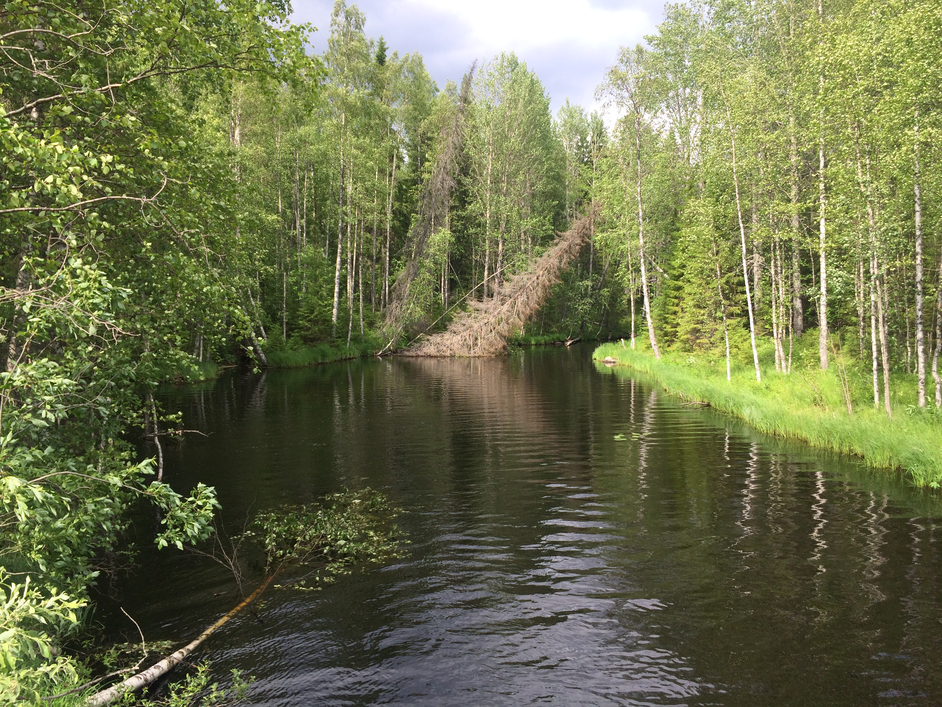 Унежма (река, впадает в Выгозеро)